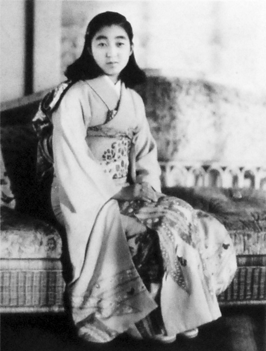 昭和天皇の皇女・成子内親王が、女子学習院中期を修了した記念写真